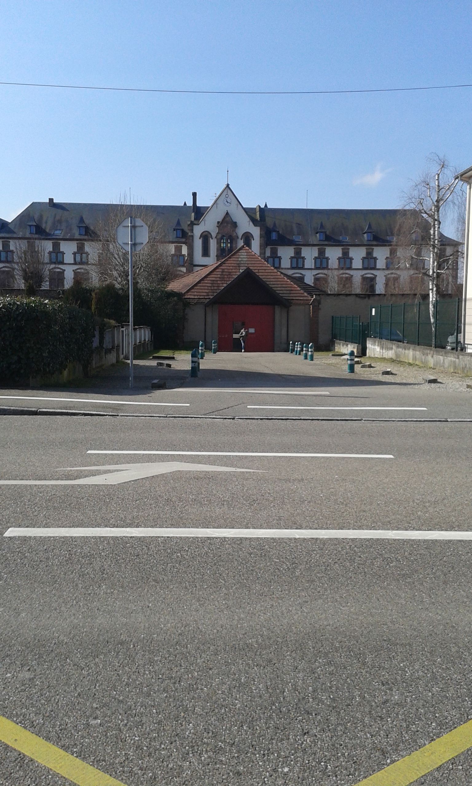 Vue du Collège des Missions Africaines depuis la Route de Marienthal